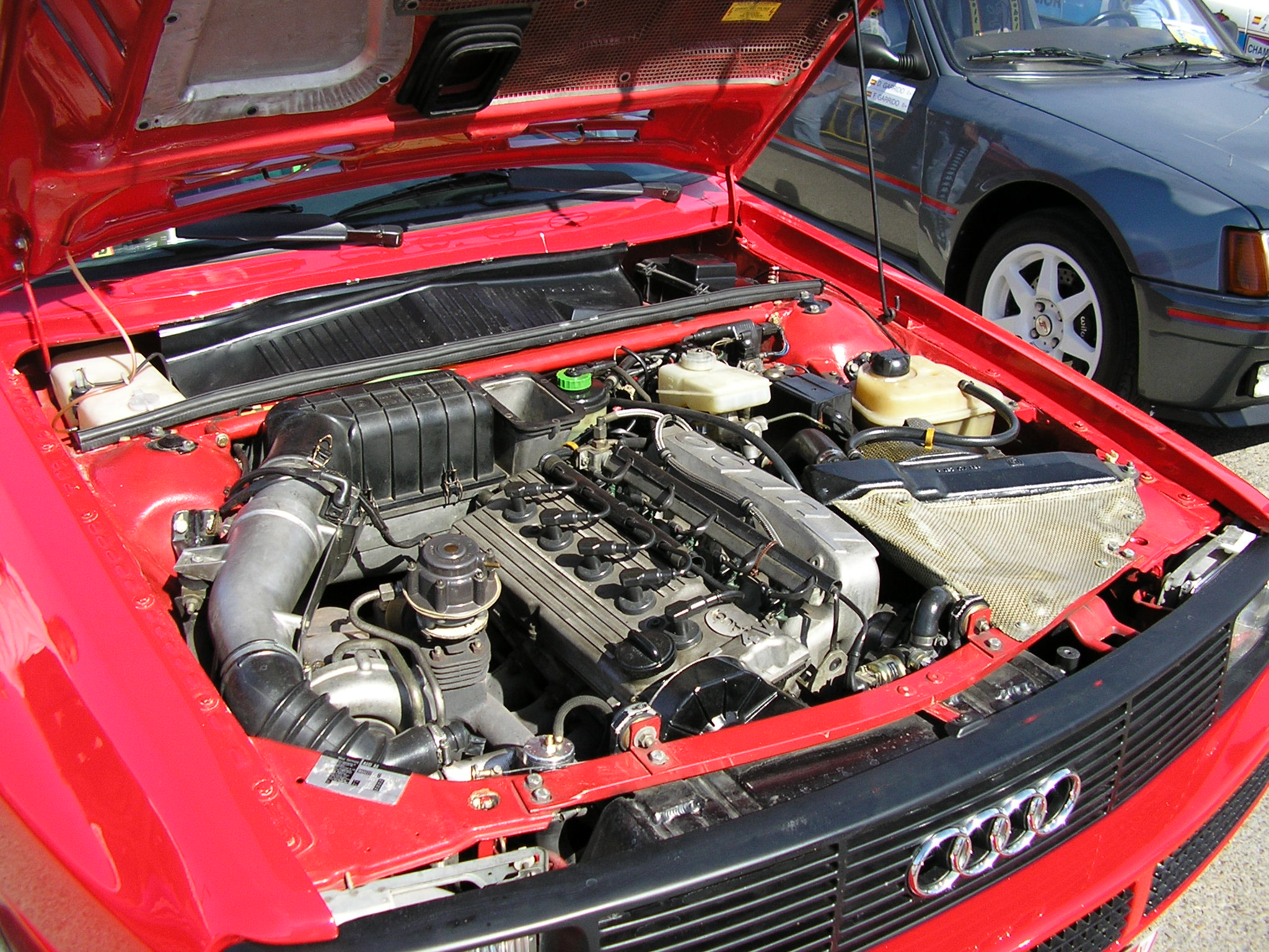 Audi Quattro engine shown in Circuito del Jarama (Madrid). Jornada de puertas abiertas 2006.